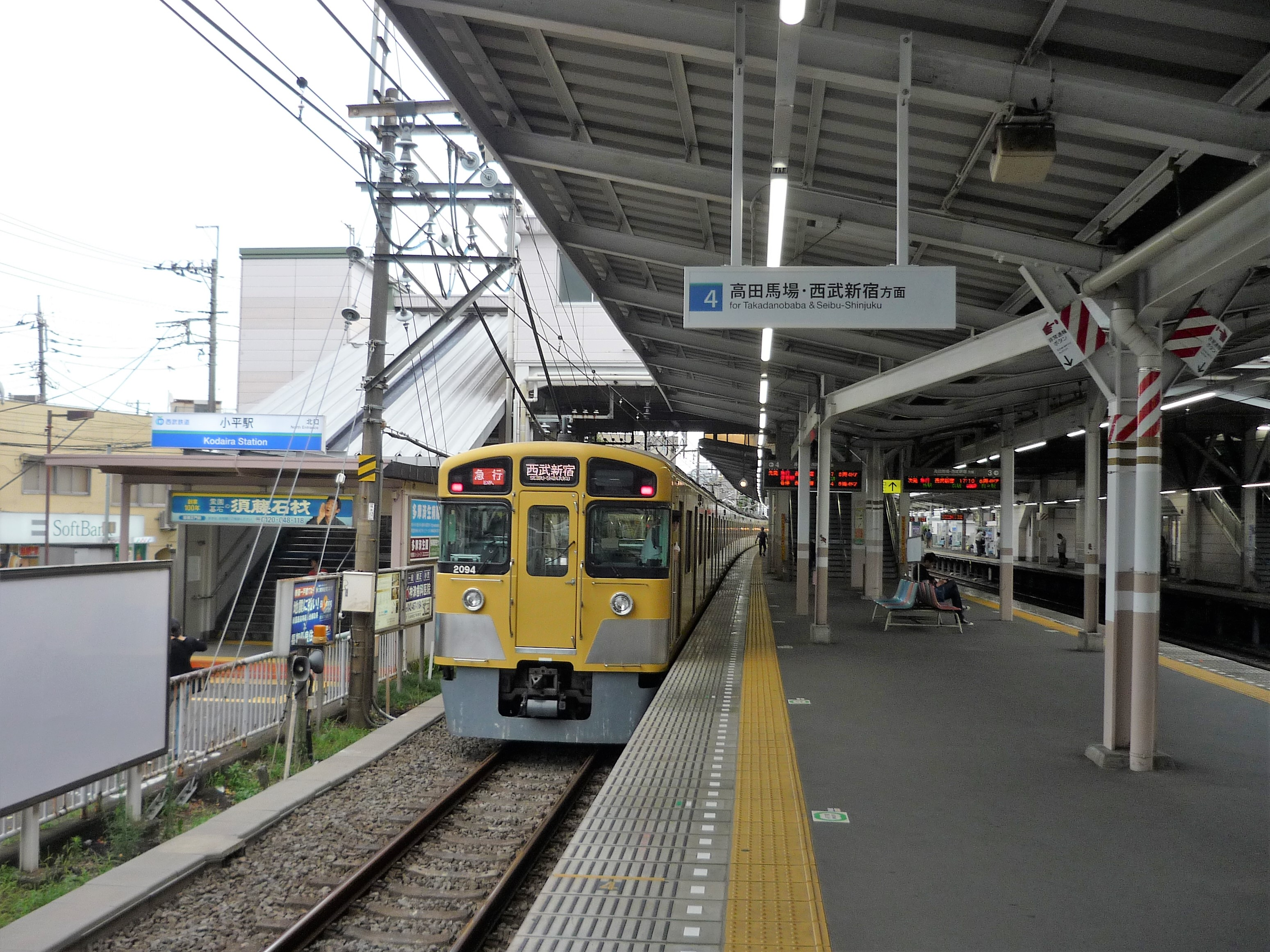 小平駅4番線を発車する西武2000系2094